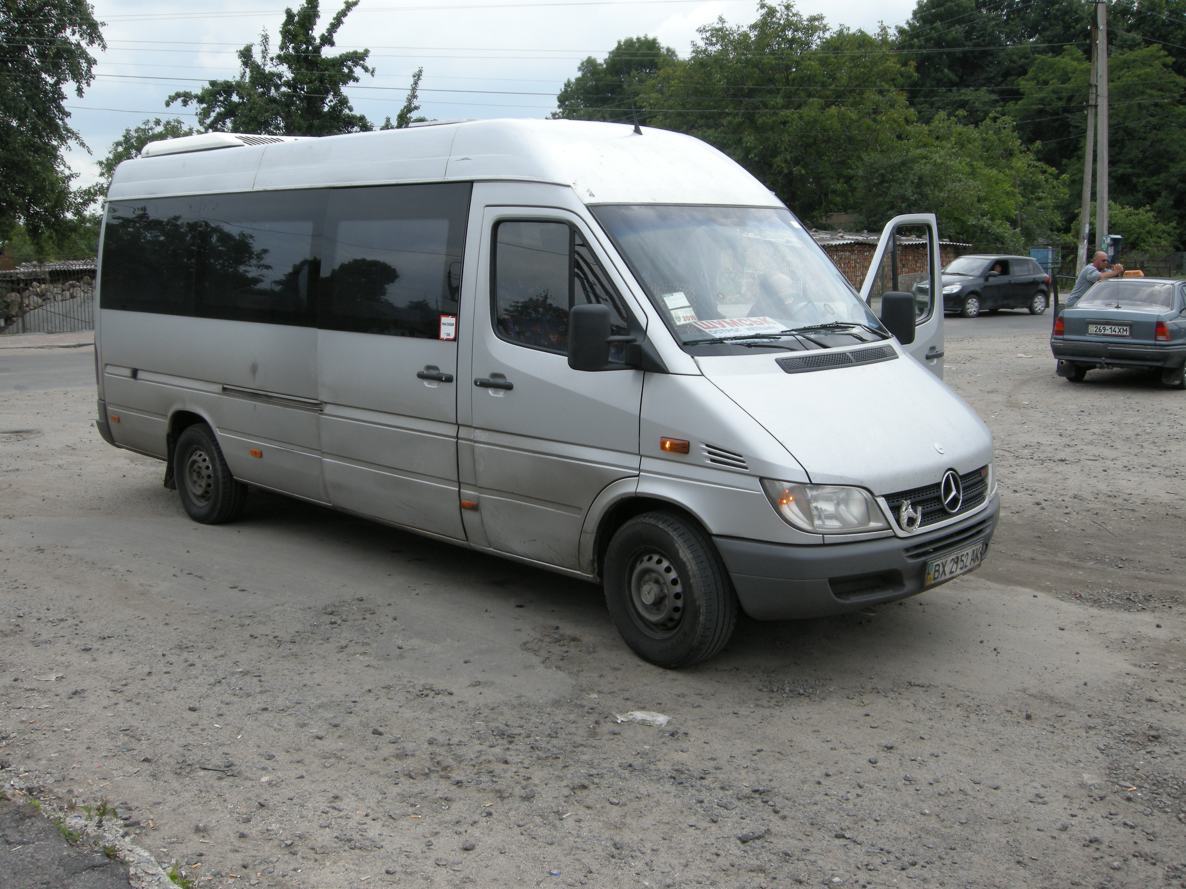 Мерседес Спрінтер в Ізяславі